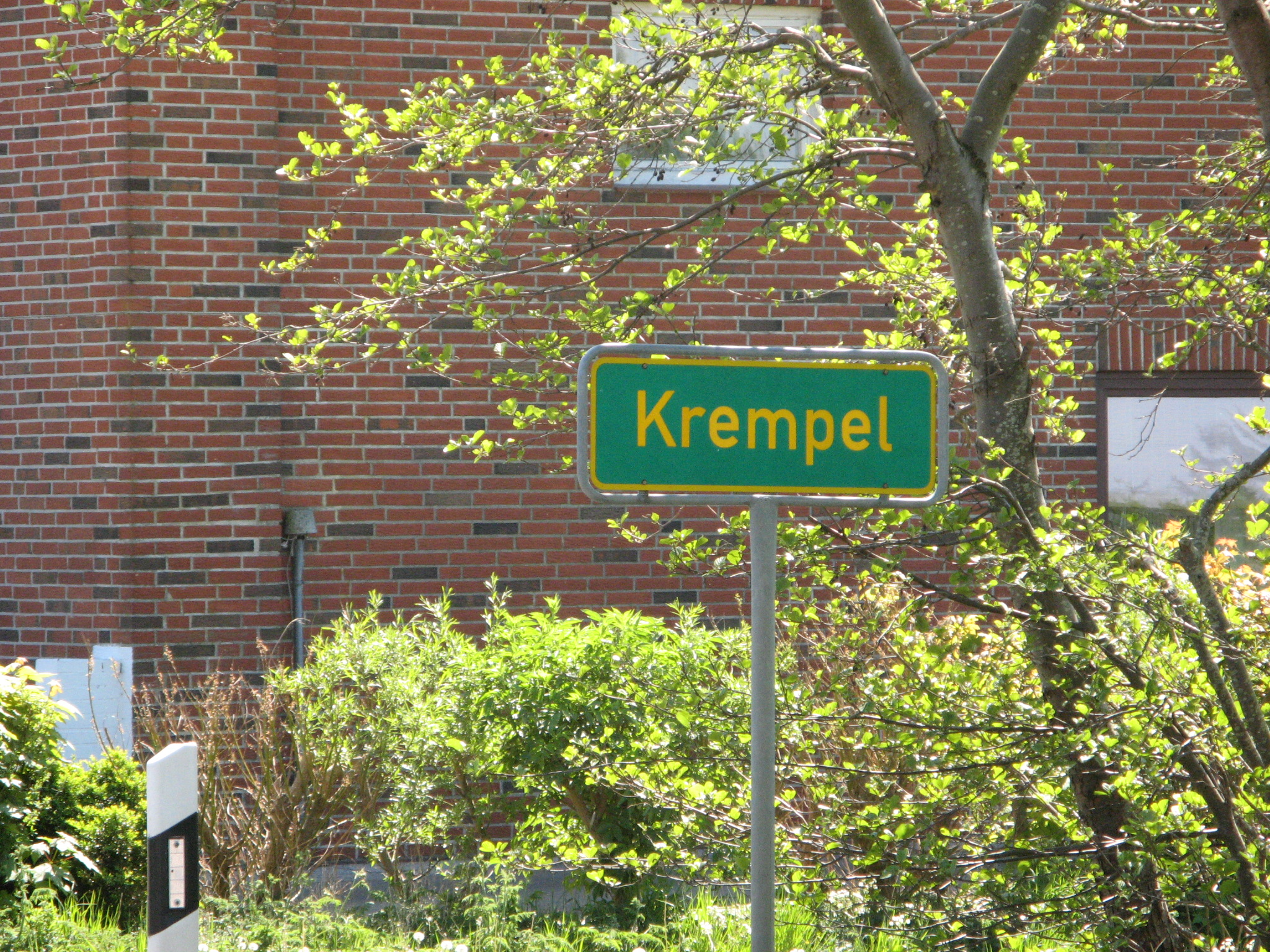 sign in Krempel Author: Dirk Ingo Franke